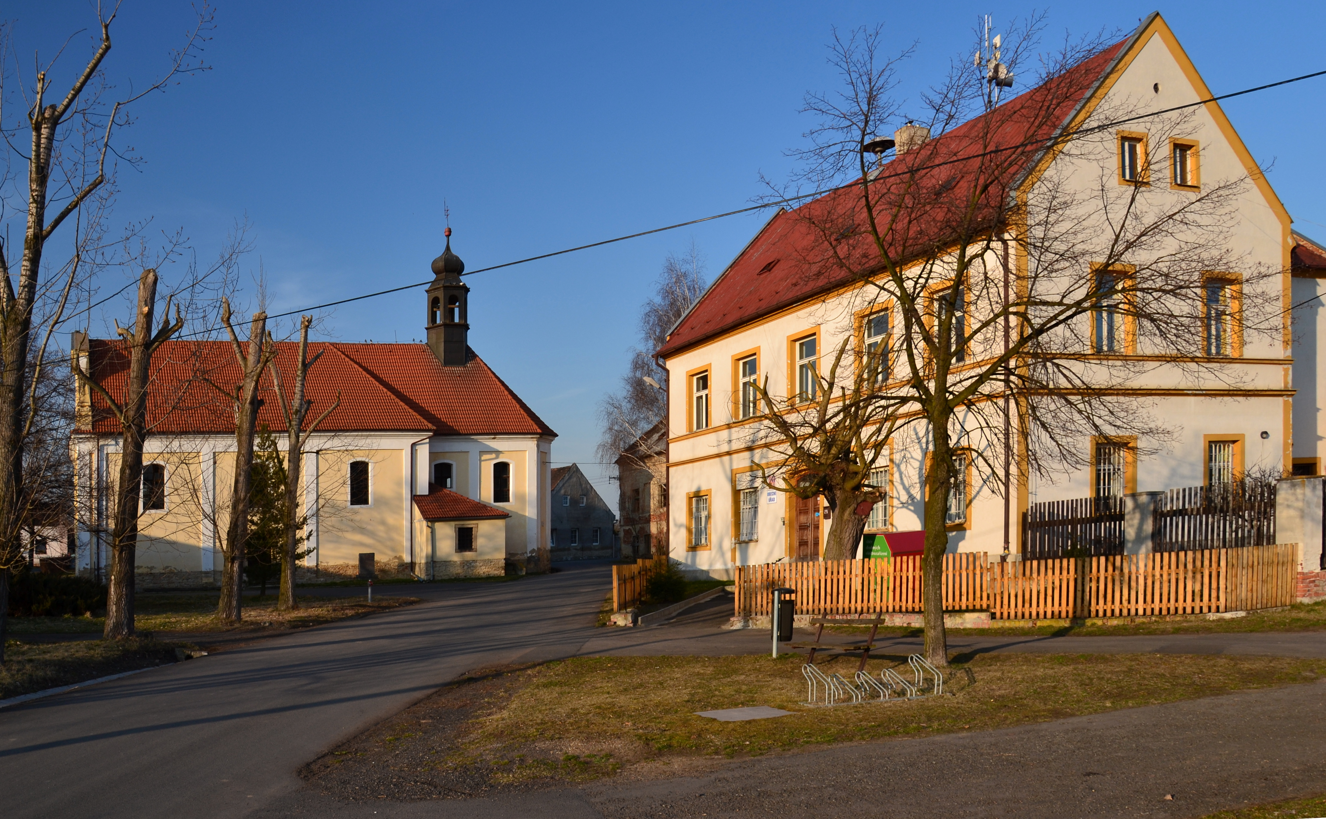 Budova obecního úřadu s kostelem svatého Bartoloměje